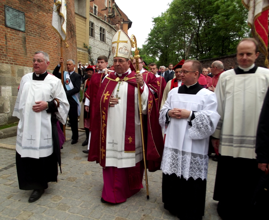 Zdjęcie zrobione podczas tradycyjnej procesji z Wawelu na Skałkę w Krakowie.